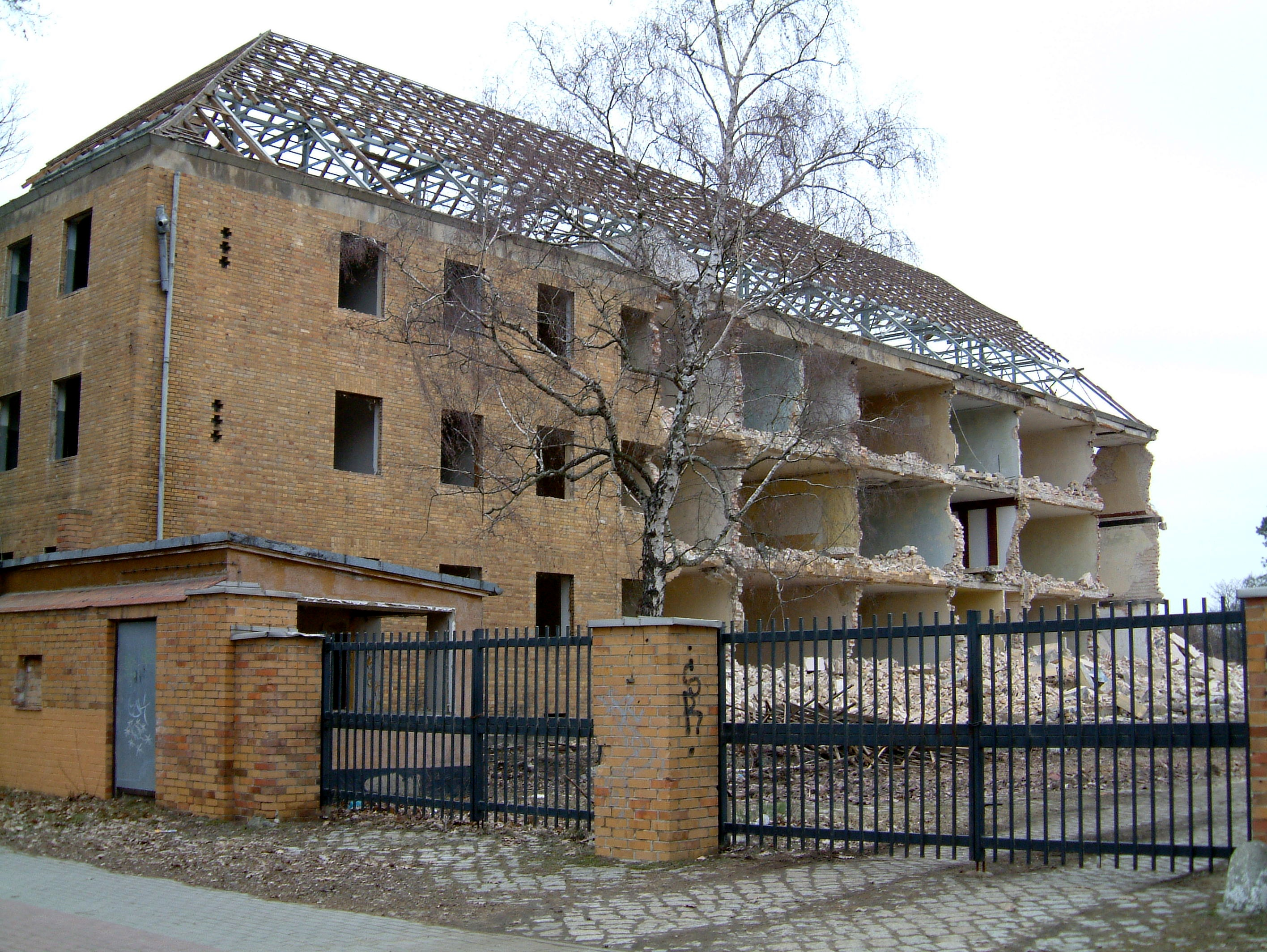 Kaserne Spremberg, Abriss der Gebäude, hier das Stabsgebäude direkt hinter dem ehemaligen Kontroll-Durchlass (KDL)